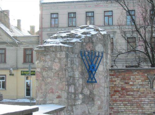 Rīgas Horala sinagoga